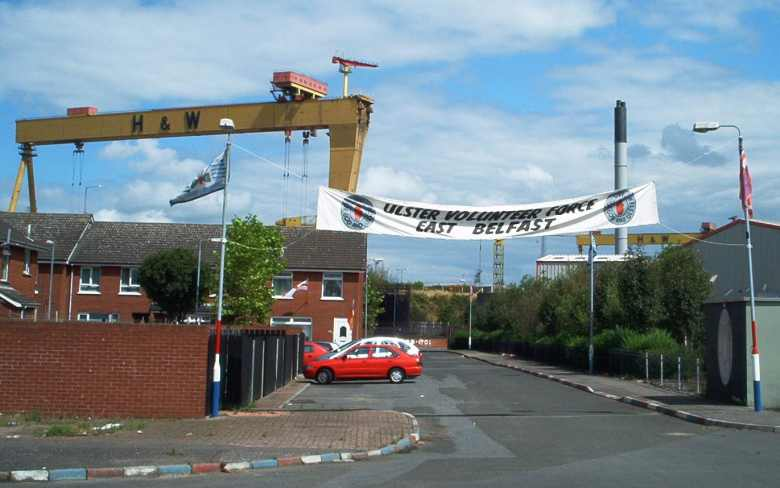 Die Harland & Wolff Kräne - Wahrzeichen von East Belfast, Juli 2003 (Eigene Aufnahme: Red Razor)